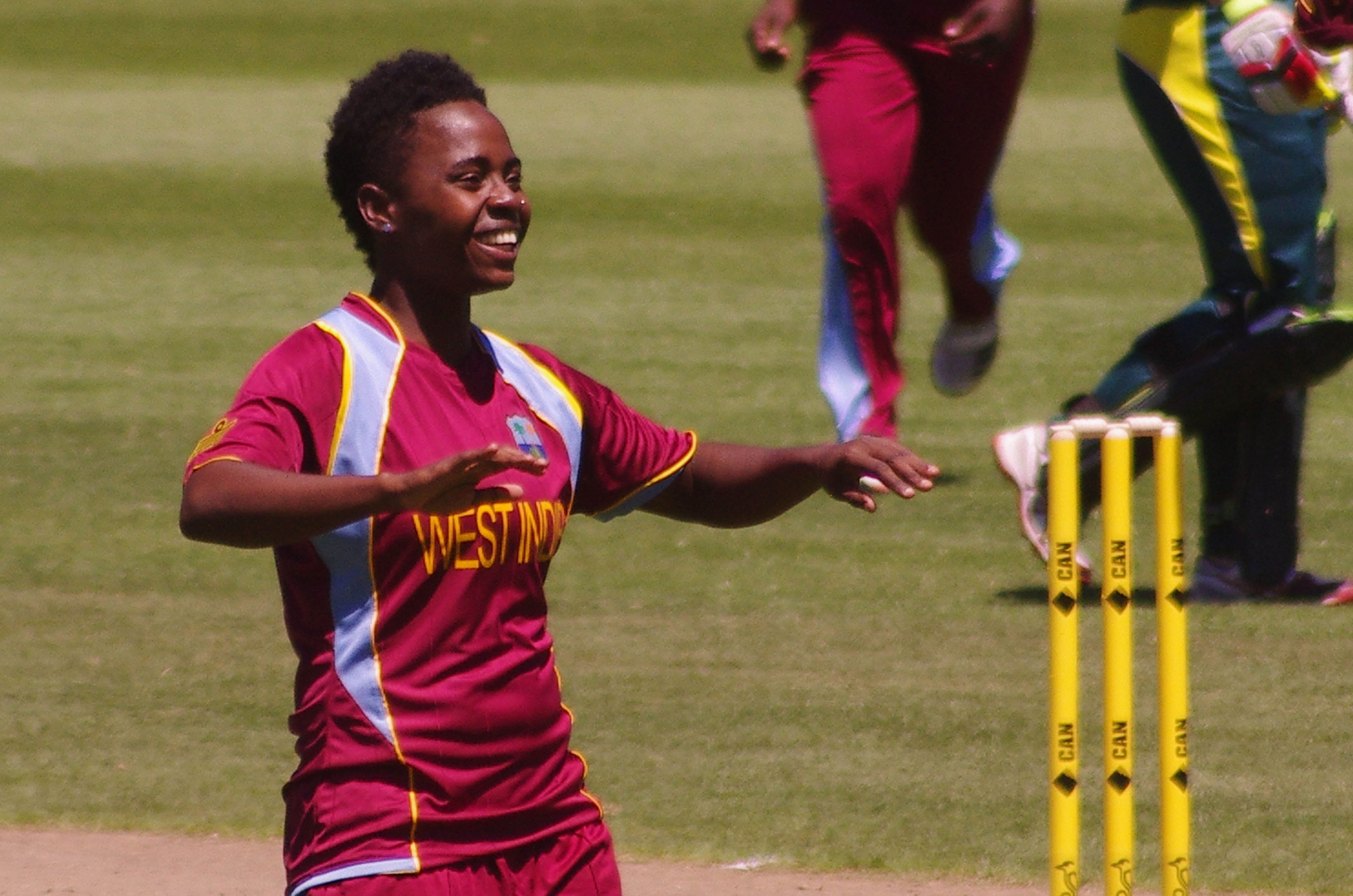 SHANEL DALEY